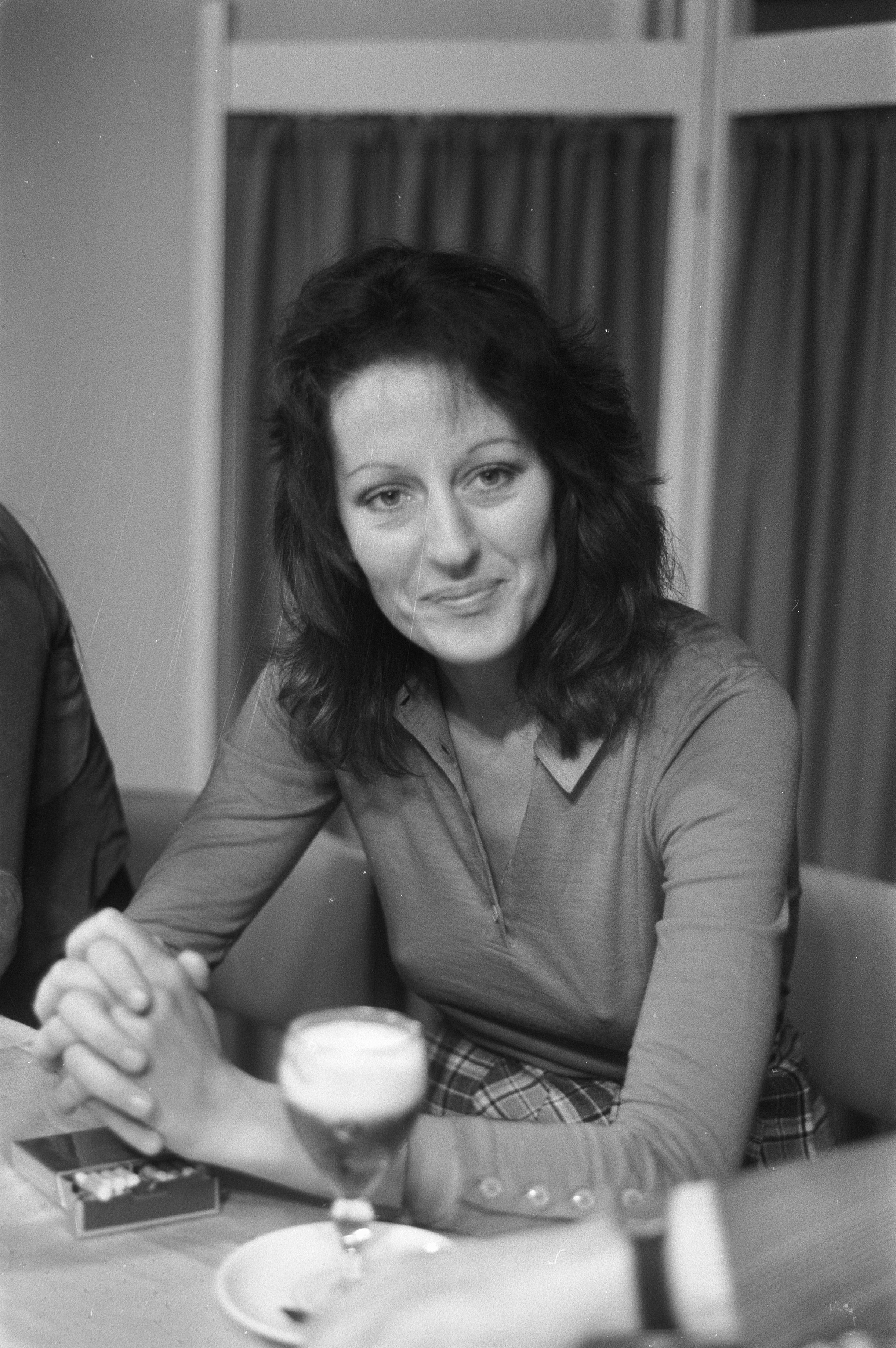 Collectie / Archief : Fotocollectie Anefo Reportage / Serie : De Australische literatuurwetenschapper en publiciste Germaine Greer tijdens de presentatie van haar boek "De vrouw als eunuch" (vertaling van "The Female Eunuch" uit 1970) in de Bijenkorf (vermoedelijk in Amsterdam) Beschrijving : Publiciste Germaine Greer Datum : 6 juni 1972 Trefwoorden : feminisme, literatuur, portretten, schrijvers, taal- en literatuurwetenschap, vrouwenemancipatie Persoonsnaam : Greer, Germaine Fotograaf : Fotograaf Onbekend / Anefo Auteursrechthebbende : Nationaal Archief Materiaalsoort : Negatief (zwart/wit) Nummer archiefinventaris : bekijk toegang 2.24.01.05 Bestanddeelnummer : 925-6493